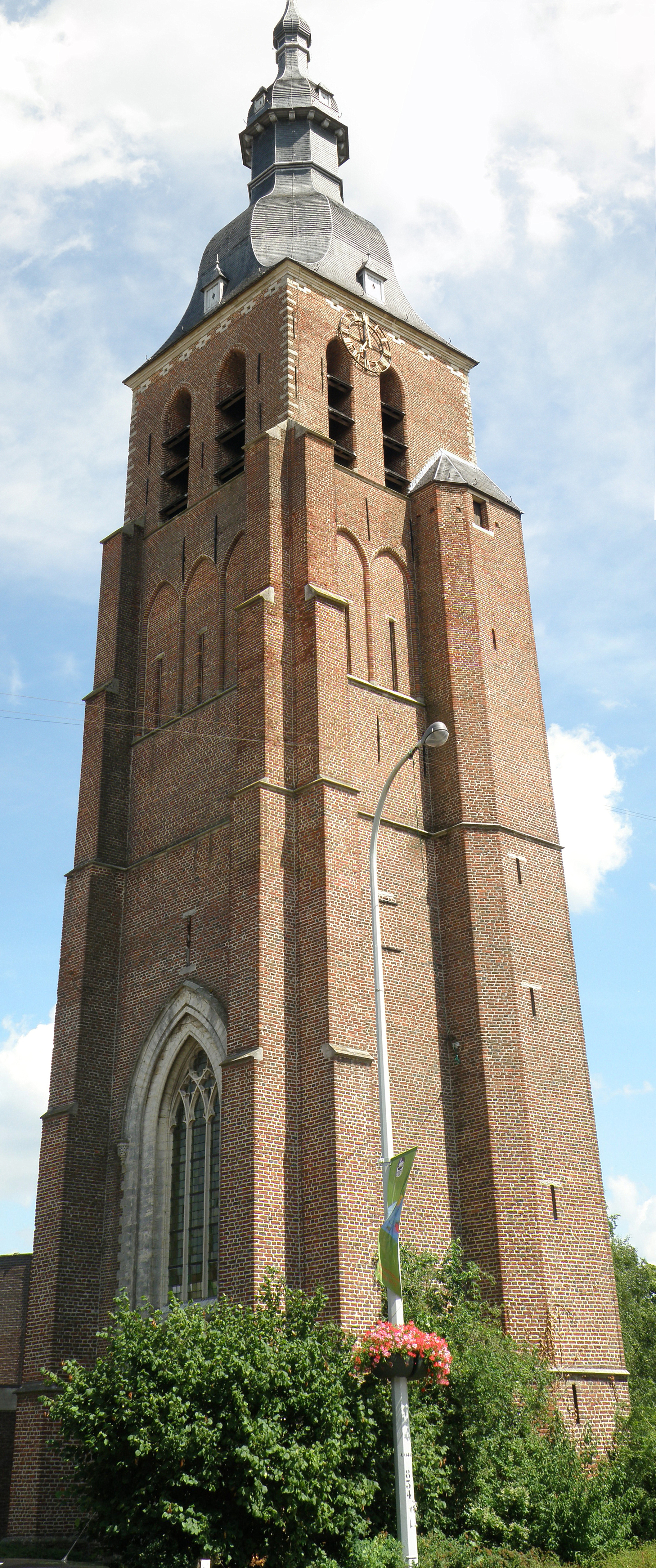 Oostmalle, gem. Malle (prov. Antwerpen, België). Sint-Laurentiuskerk.